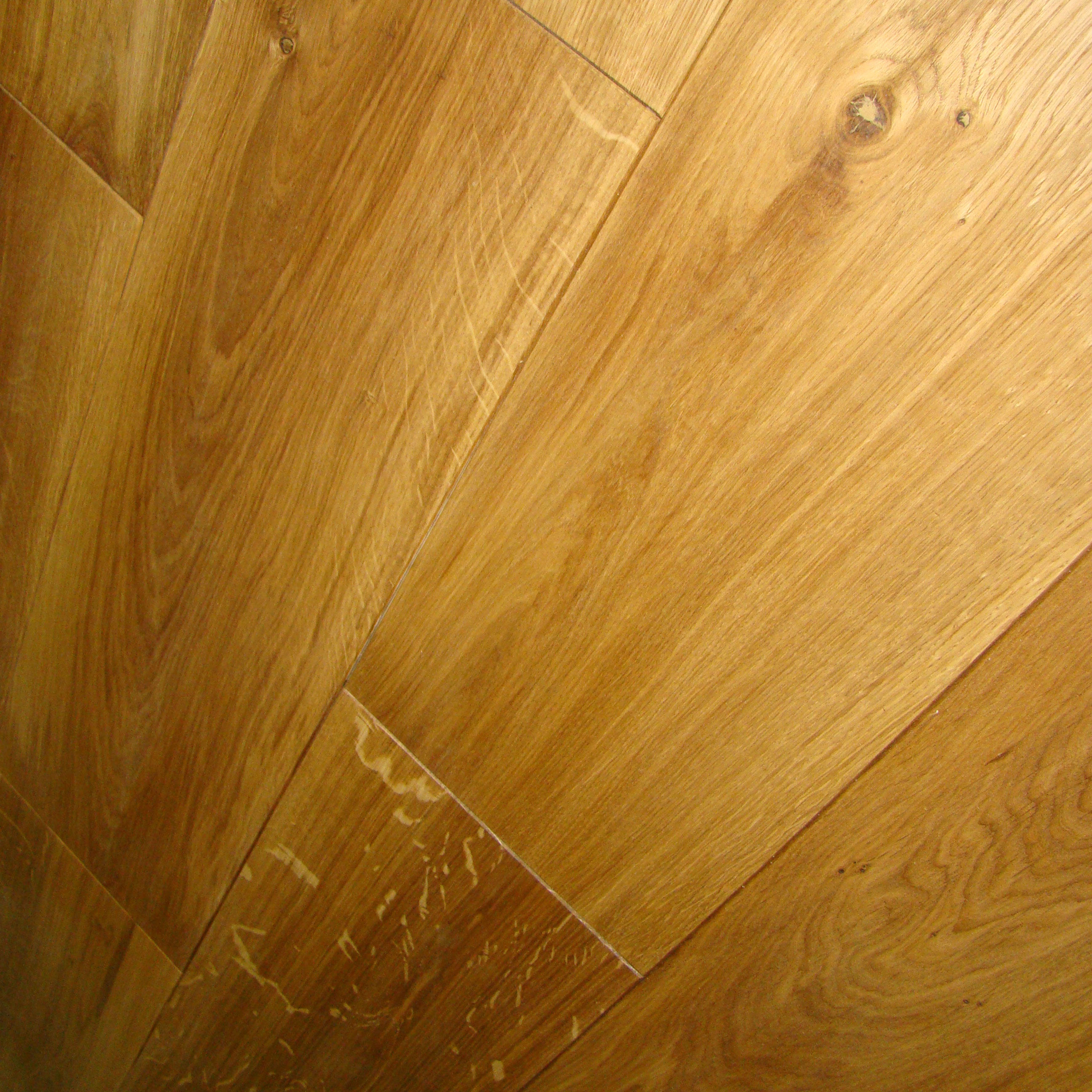 Массивный паркет из дуба